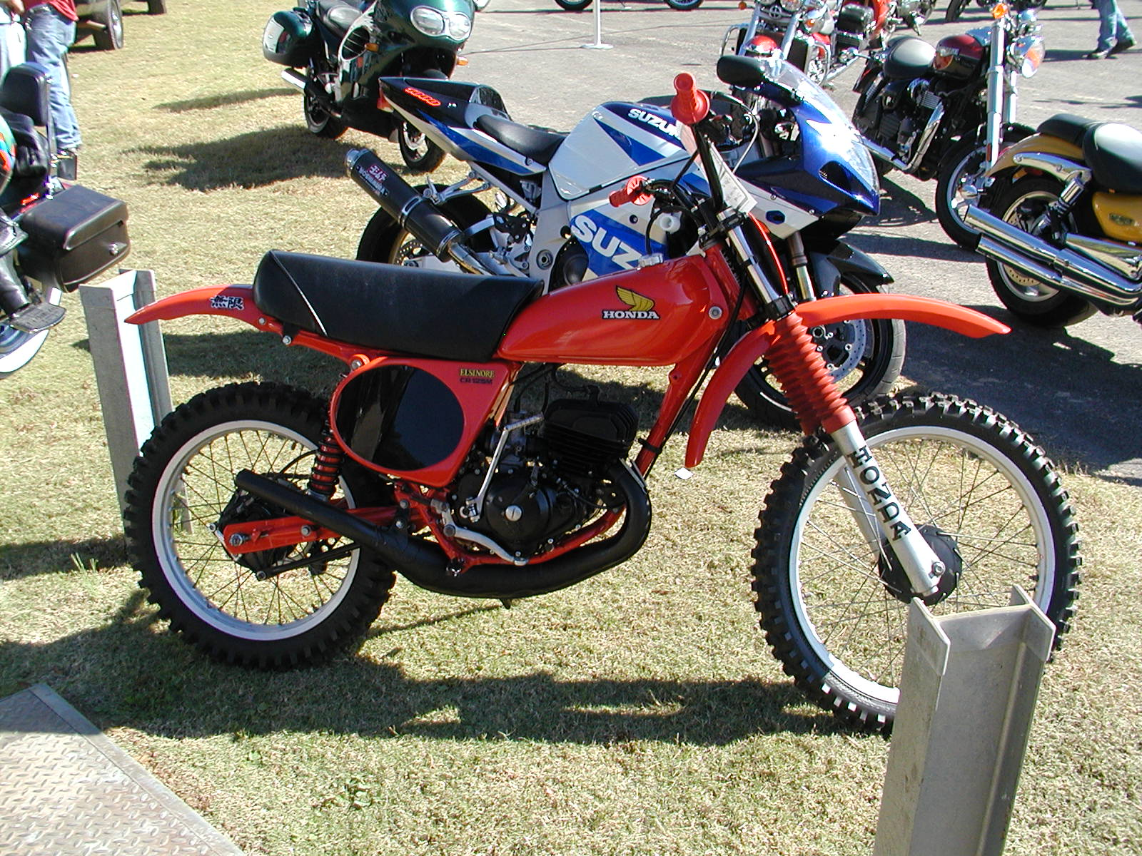 Honda CR125M ELSINORE 1978